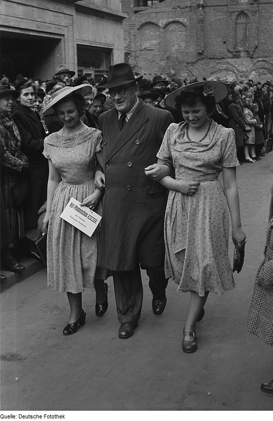 Original image description from the Deutsche Fotothek Hutmodenschau auf der Straße